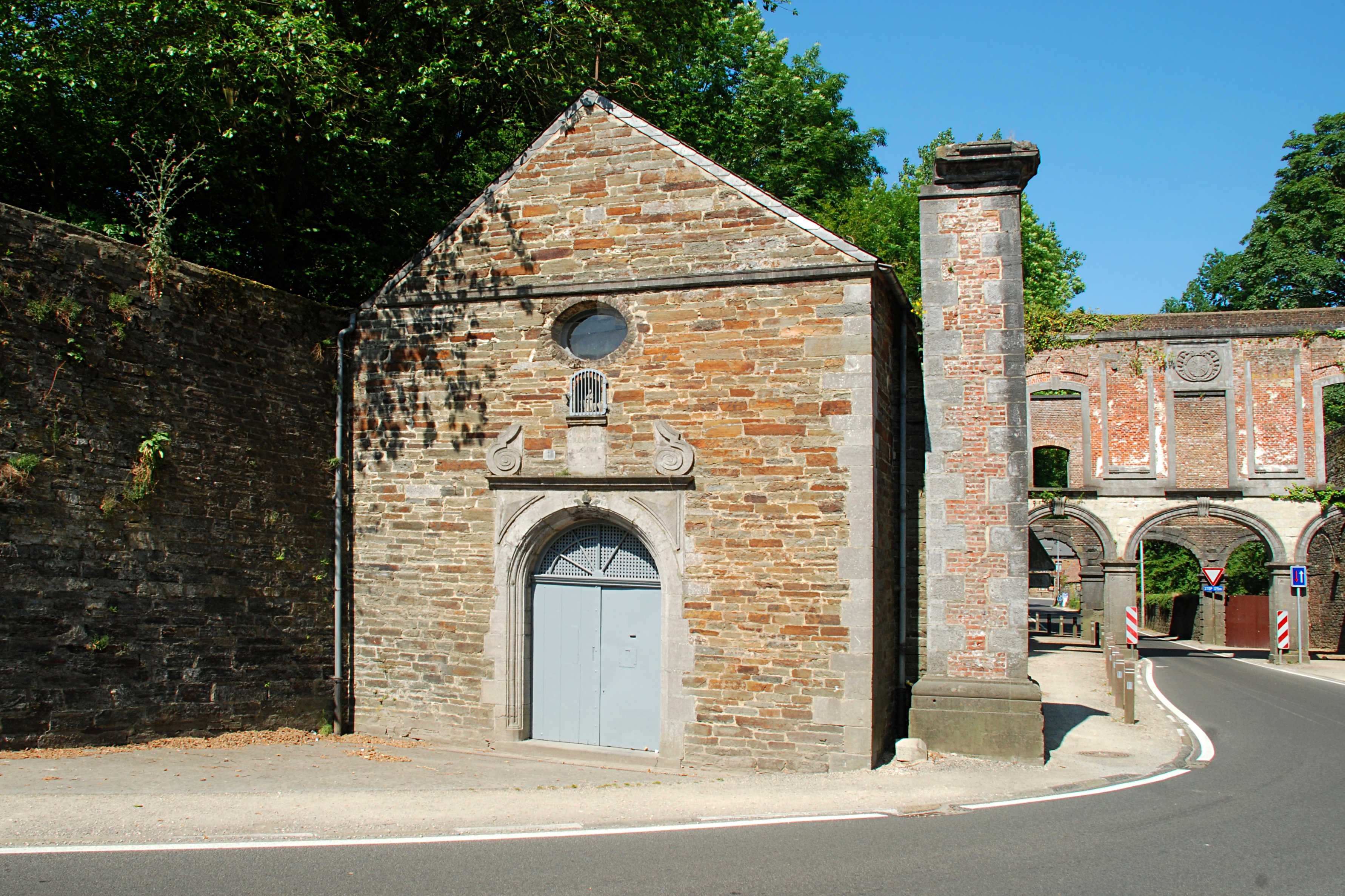 Belgique - Brabant wallon - Villers-la-Ville - Chapelle Saint-Bernard